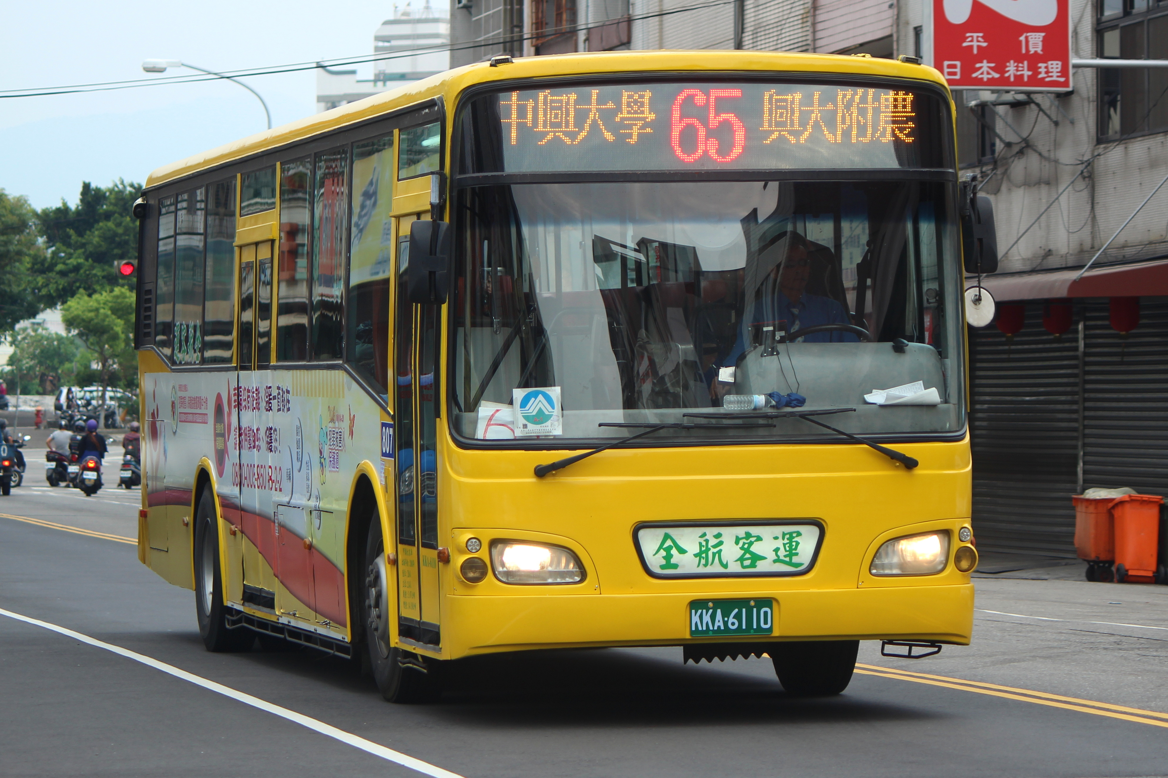 65 明德高中(南門路)